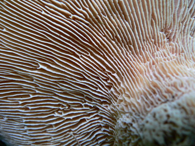 Becherförmiger Sägeblättling (Lentinus cyathiformis), Lamellen Fotografiert von DGFM-Forumsnutzer Alis 2008, freigegeben für Wikipedia hier: Bildquelle